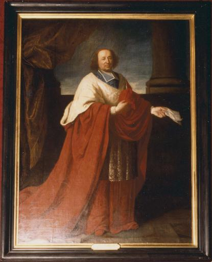 Pierre du Cambout de Coislin (1636-1706), évêque d'Orléans. Ce tableau fait partie d'un ensemble de treize portraits en pied de descendants de la famille de Sully.